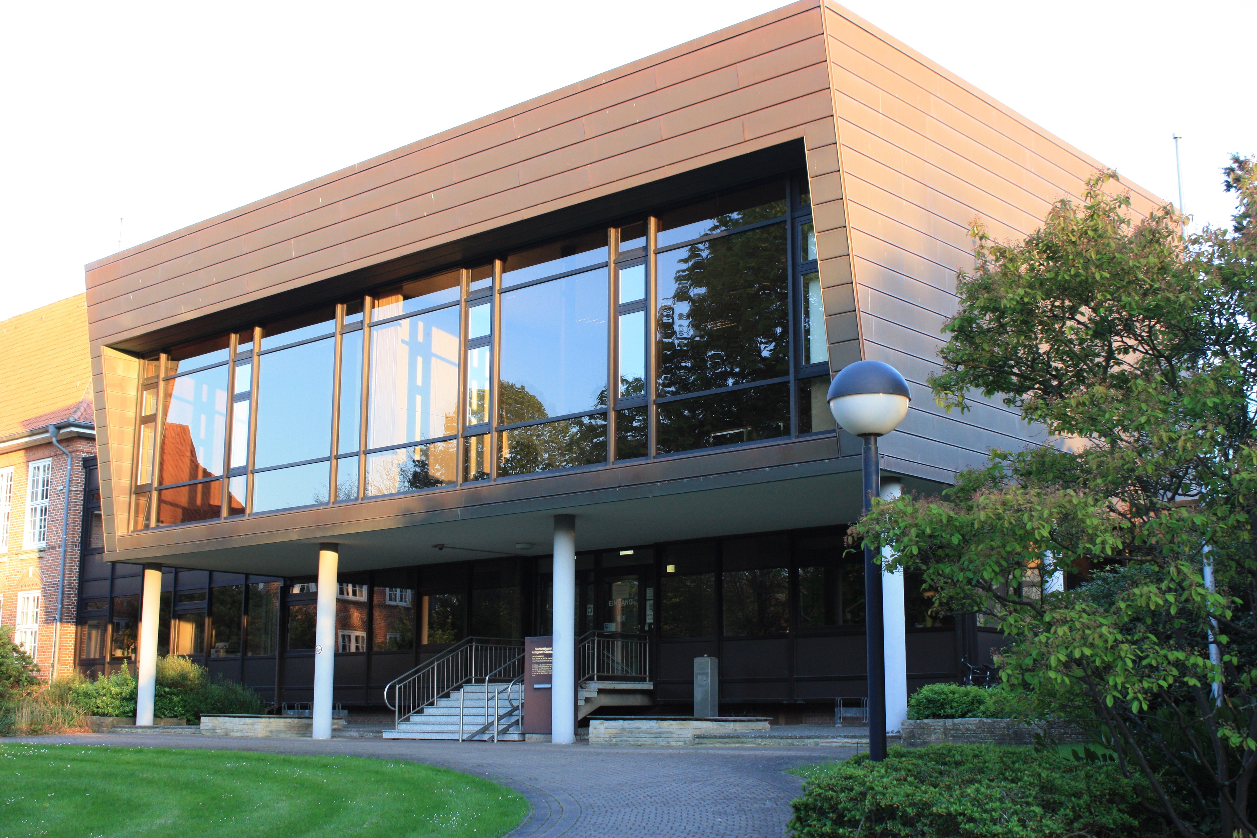 Neubautrakt des Amtsgerichtes Oldenburg in Holstein